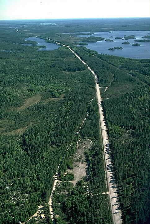 E4:an norr om Gävle med Högbackasjön till höger. Bilden troligen från början av 1980-talet. Motiv: Högbacka Nyckelord: Flygbilder Kategori: Vägar, Skogslandskap E4:an norr om Gävle med Högbackasjön till höger. Bilden troligen från början av 1980-talet.